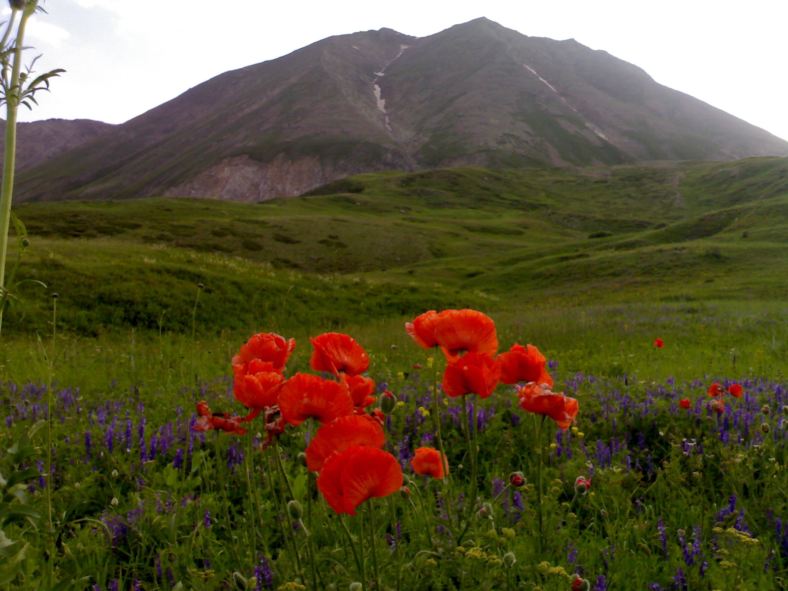 Kurdî: Kosedax